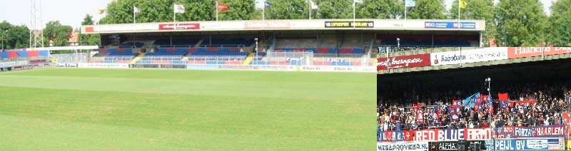 Tribune noord gezien vanaf zuid. Inzet is van de wedstrijd HFC Haarlem - Stormvogels Telstar 10-10-2004